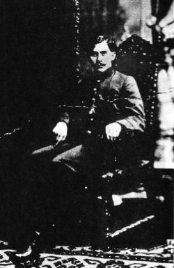 El Zapatista general Jesus Guajardo